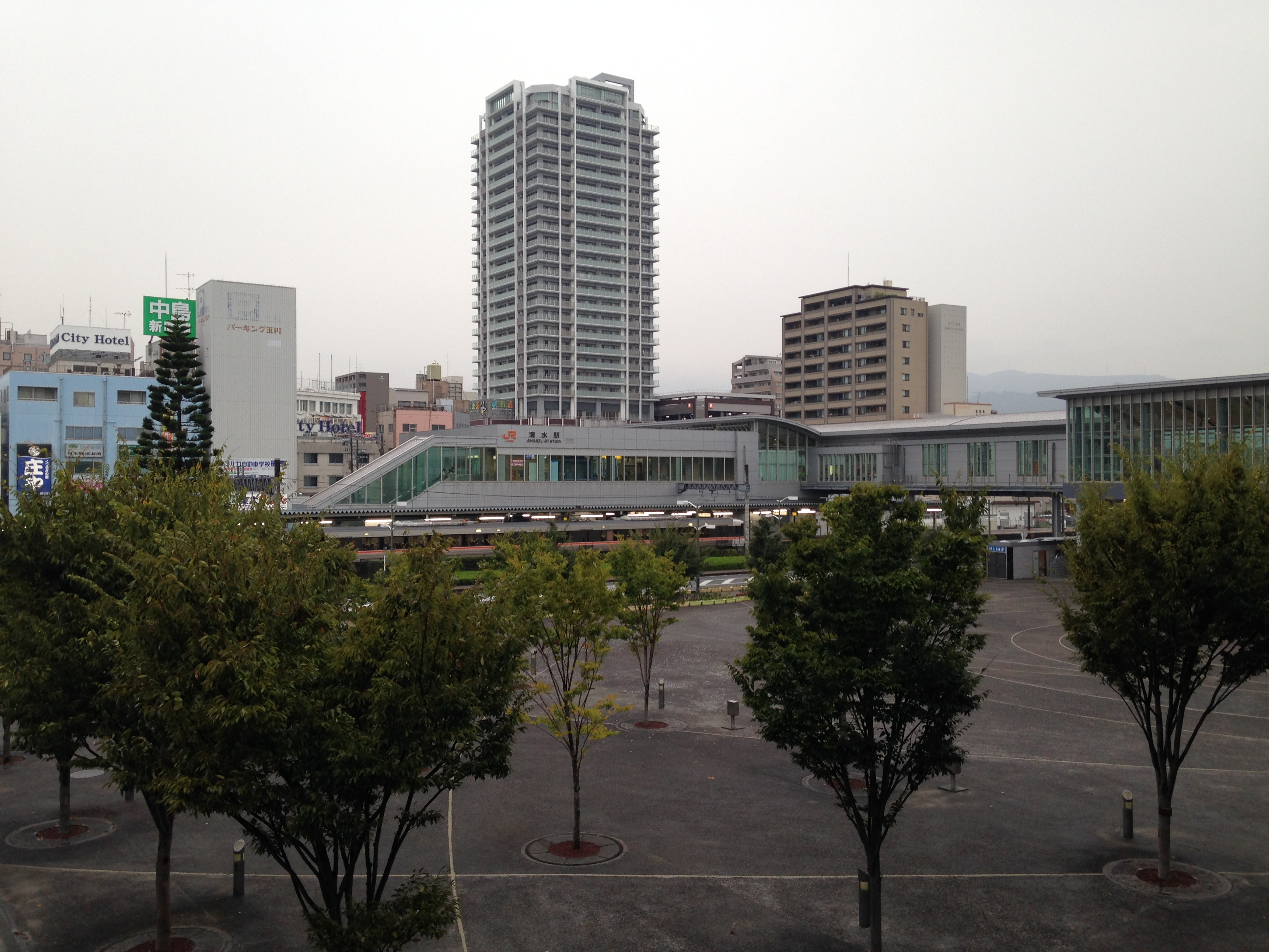 清水駅(静岡県)の遠景